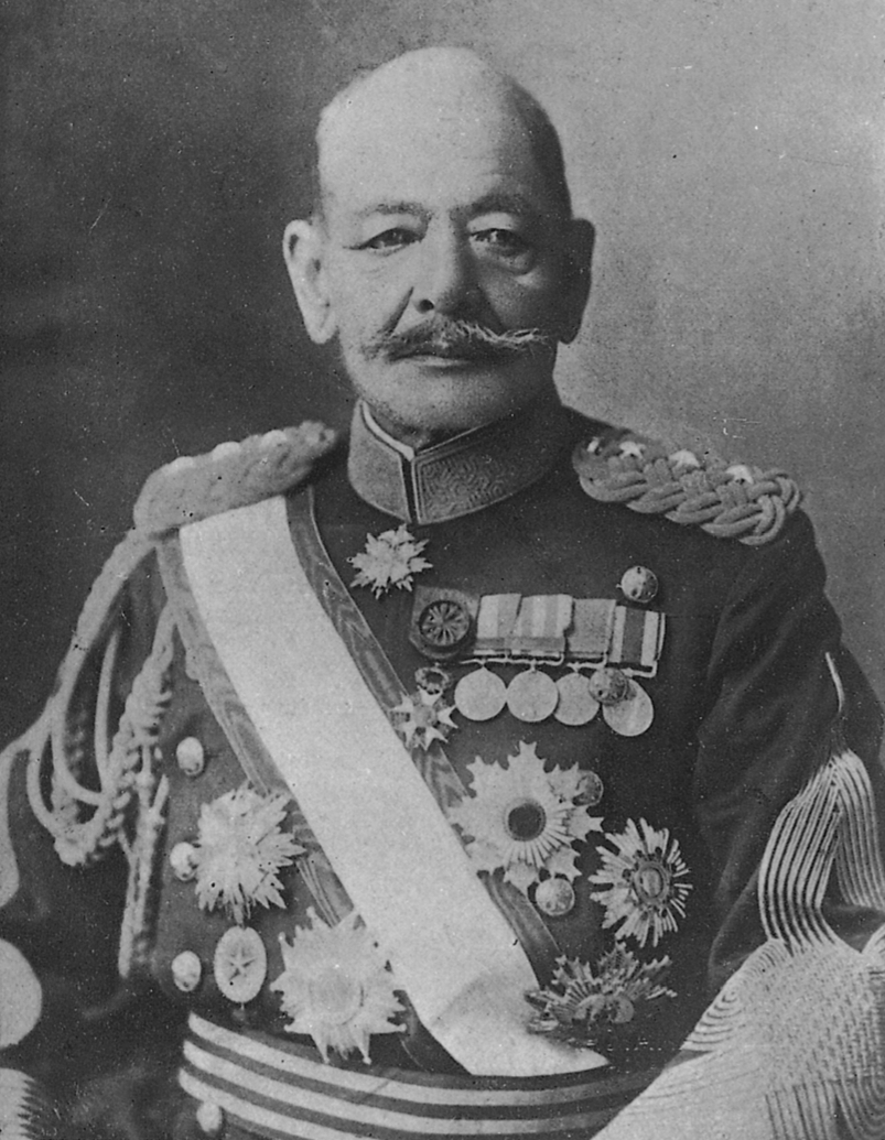 Portrait of Akiyama Yoshifuru (秋山好古, 1859 – 1930)